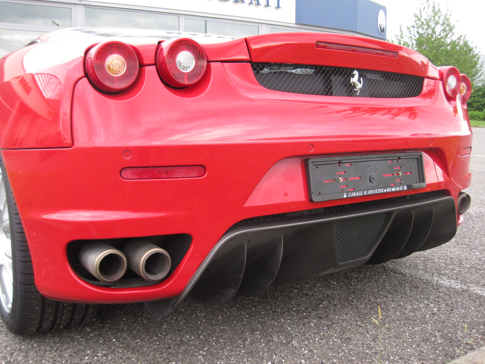 Ferrari F430 Berlinetta